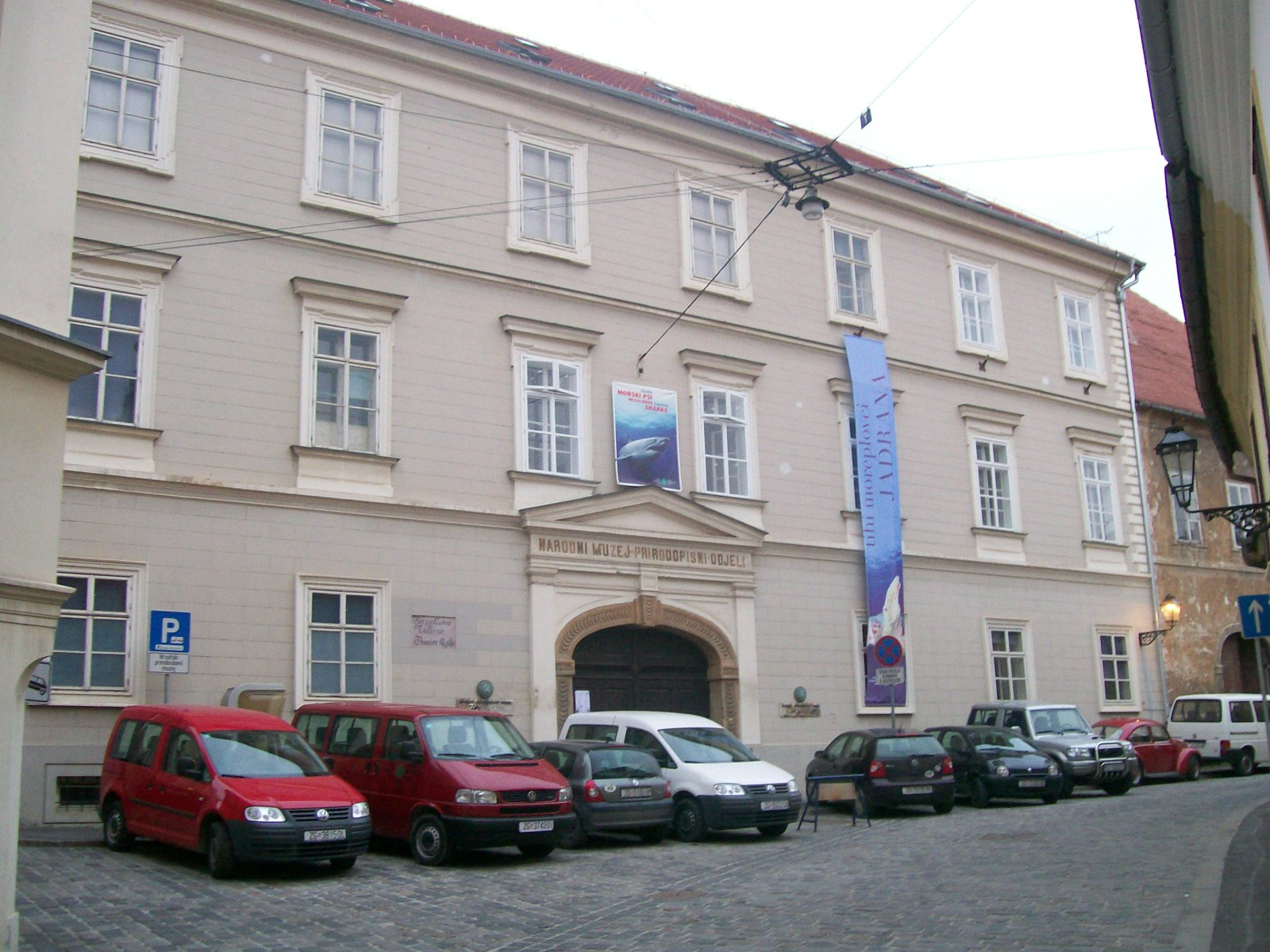 Hrvatski prirodoslovni muzej Zagreb